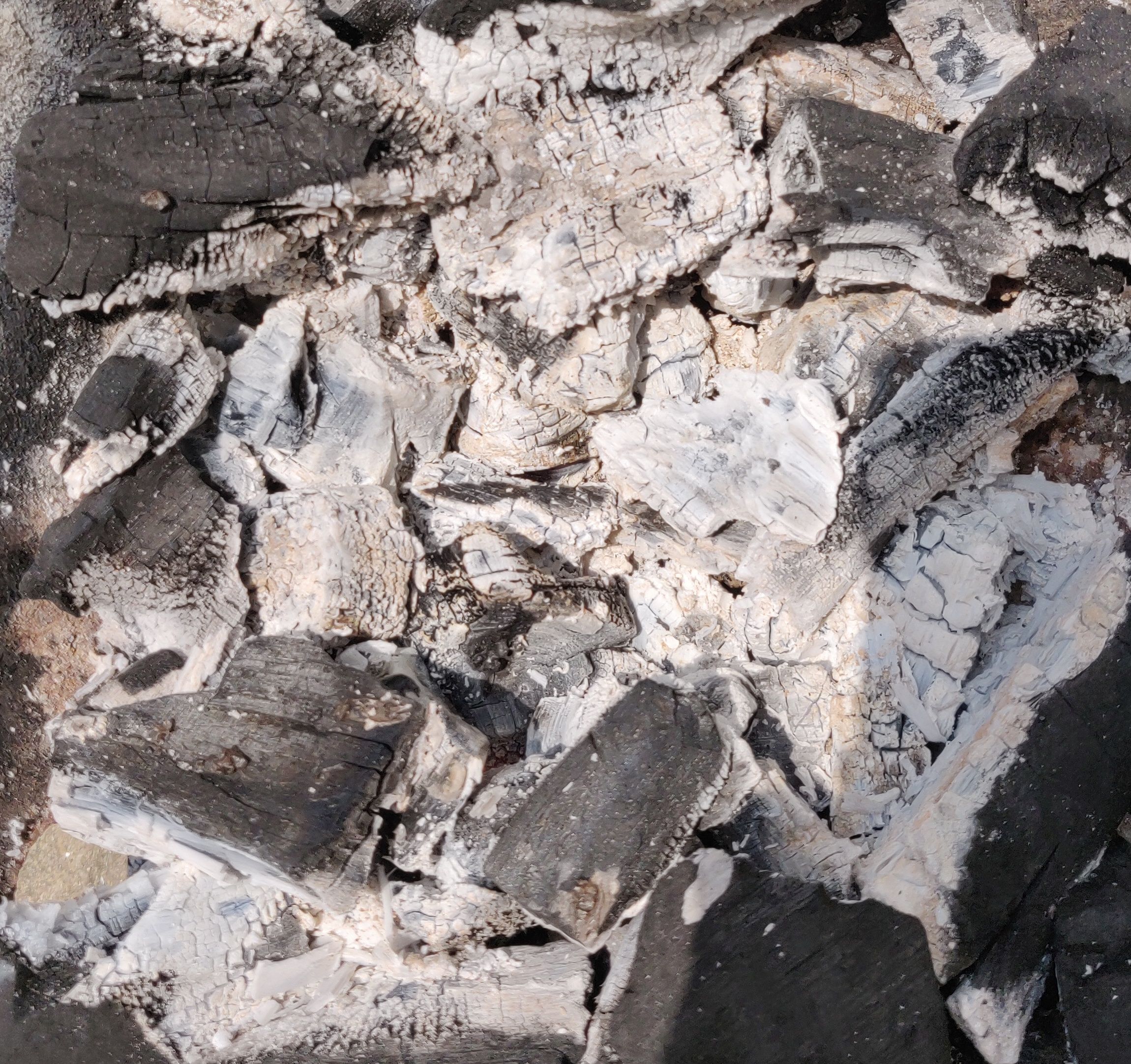 החומר שנותר בכירה לאחר שהגחלים נשרפו, נקרא אפר.